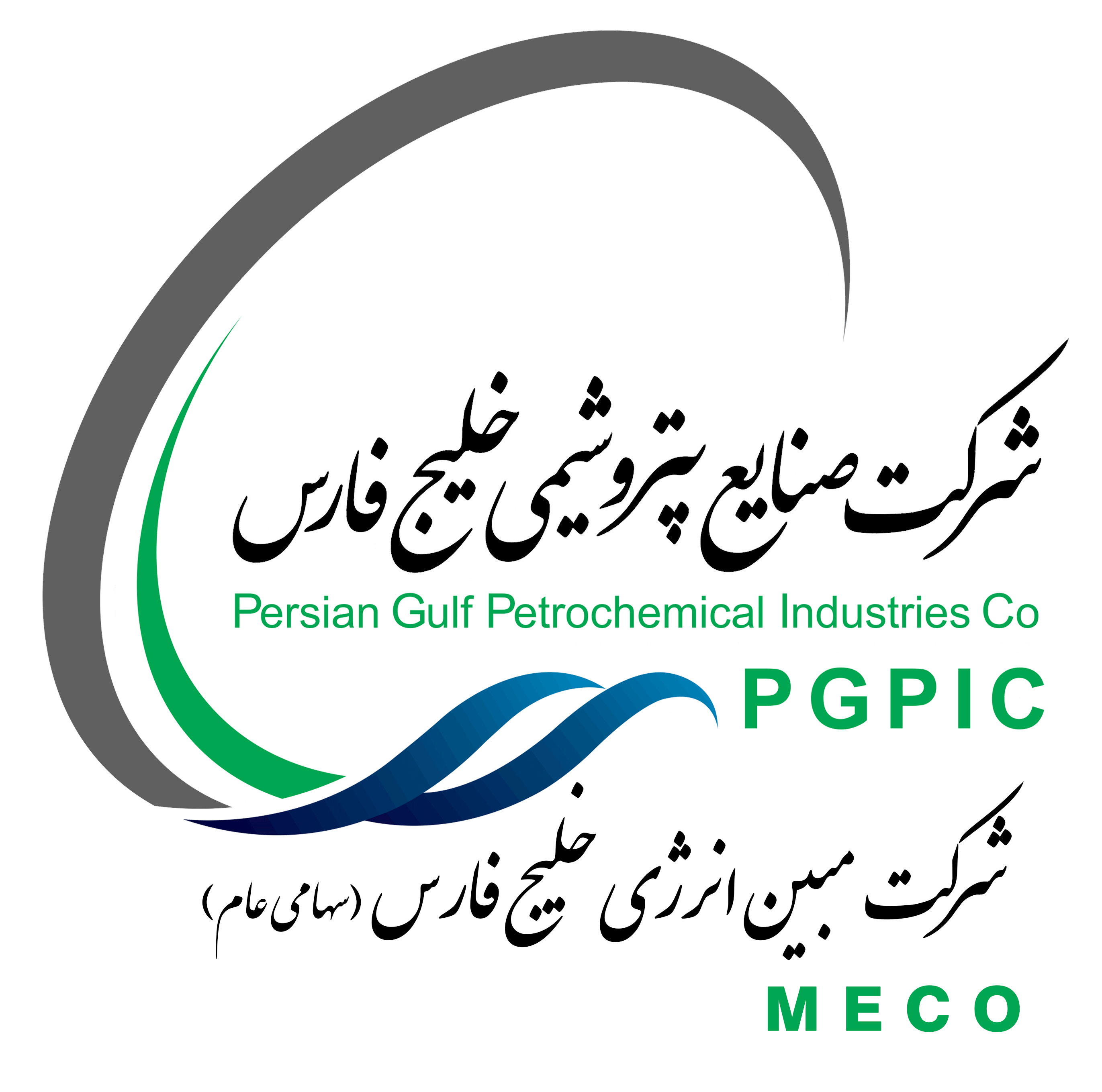 لوگو شرکت مبین انرژی خلیج فارس